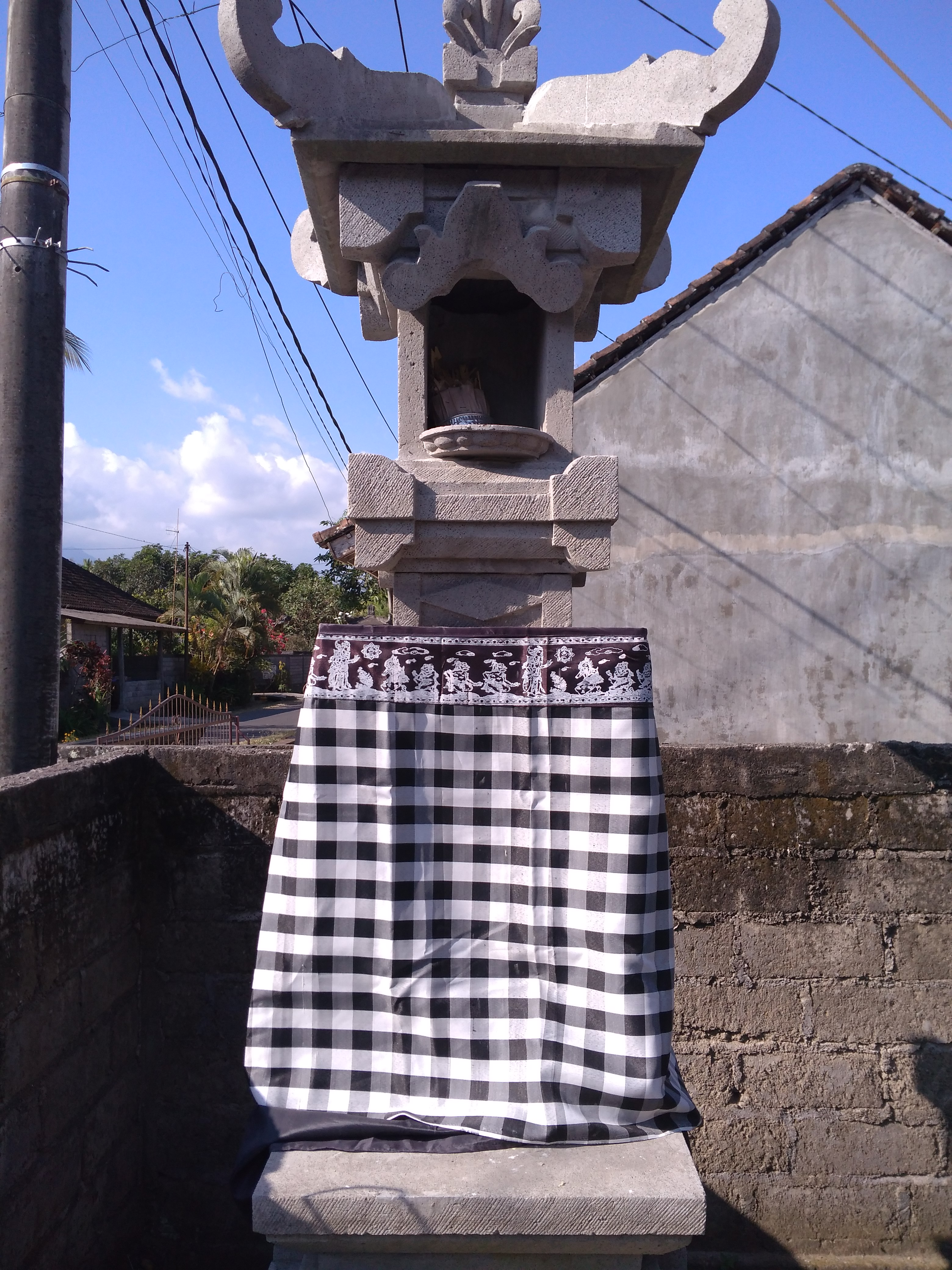 merupakan salah satu tugu yang dalam kepercayaan umat Hindu Bali